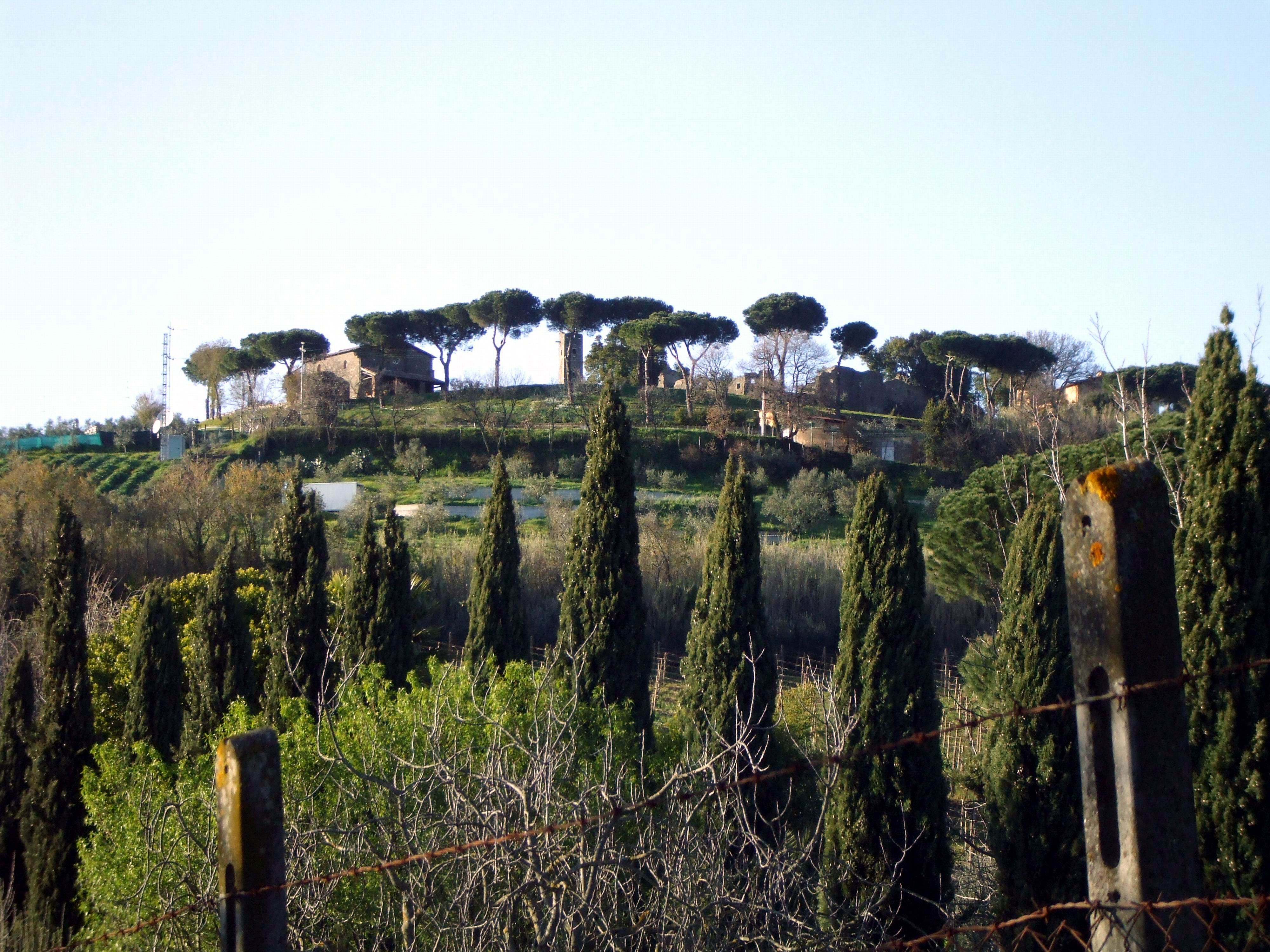 Albano L. Monte Savello e ruderi Castel Savello